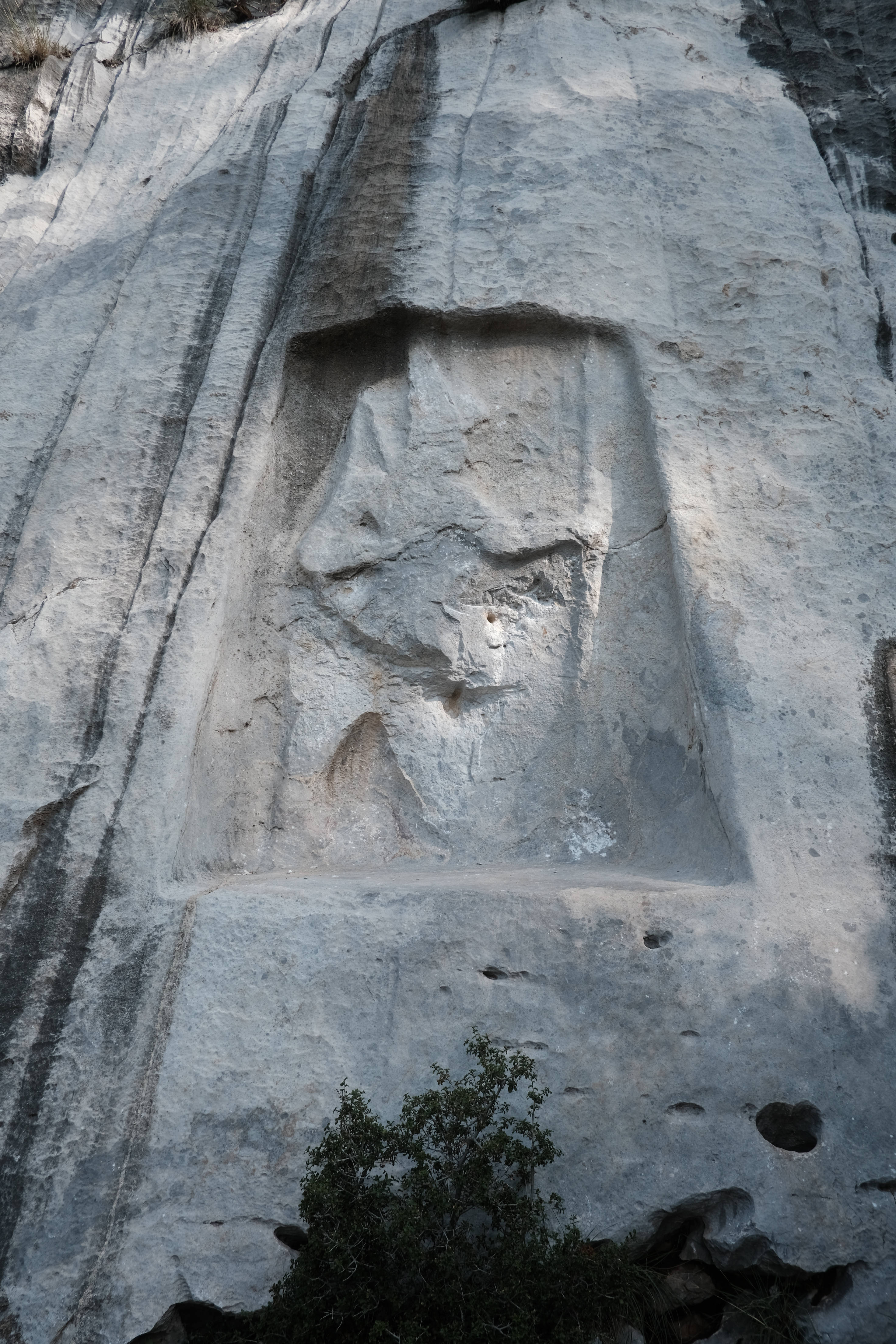 Vue du relief de Karabel, Izmir, Turquie